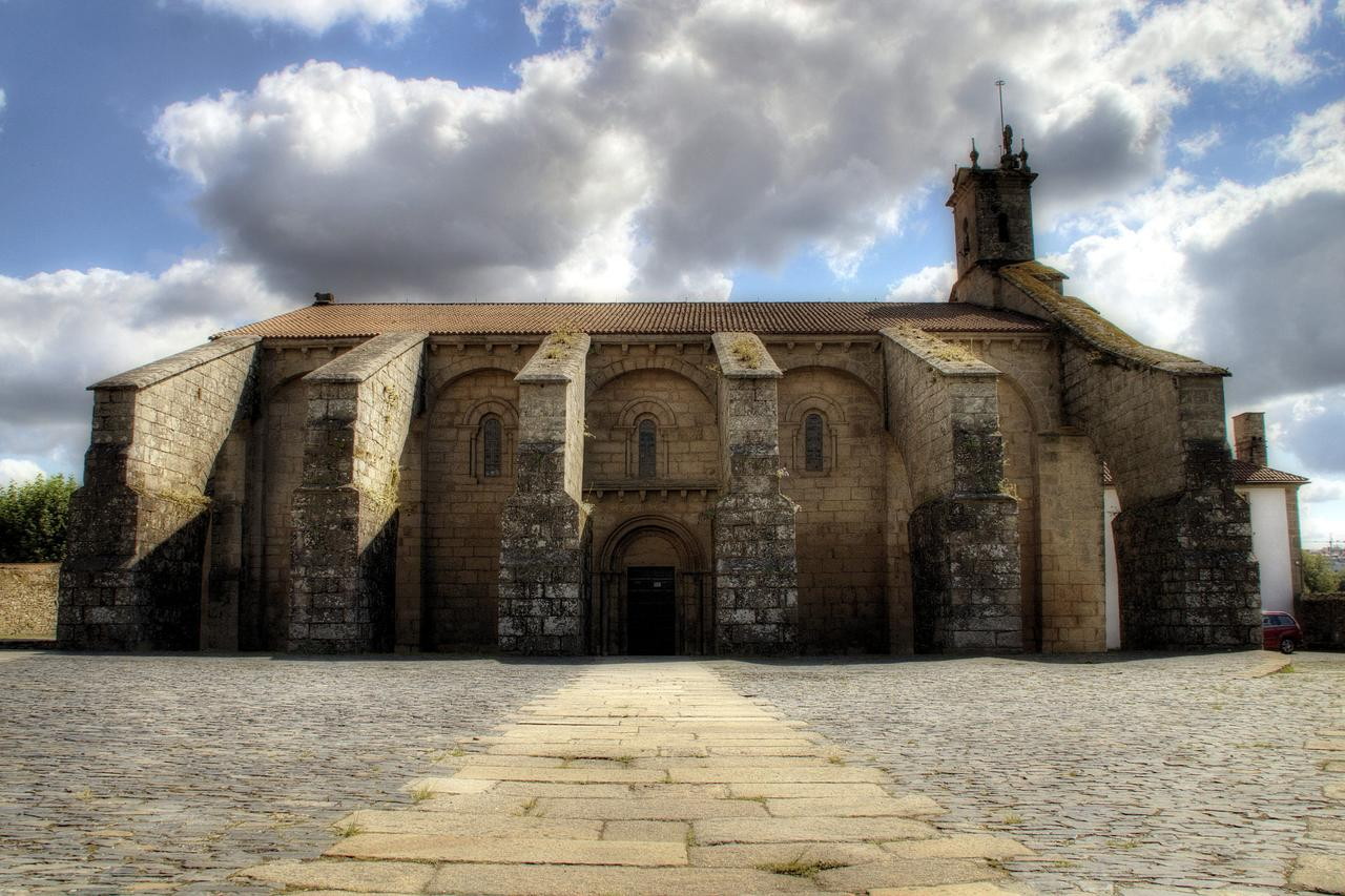 Colexiata Santa María a Maior e Real do Sar, Santiago de Compostela